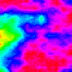 Фрактал плазма.